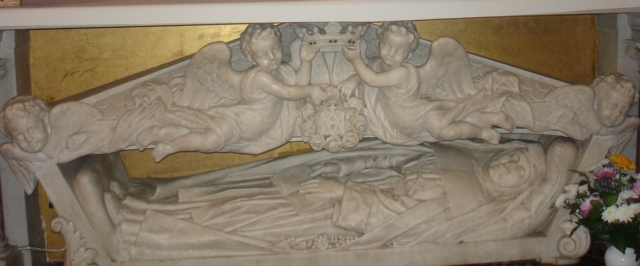 Escultura de Fournier a la tomba de Santa Joana de Lestonnac, al Col·legi de la Companyia de Maria de Bordeus. 1900